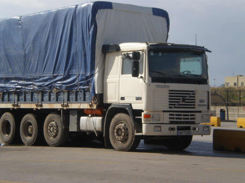 Czteroosiowe Volvo F12